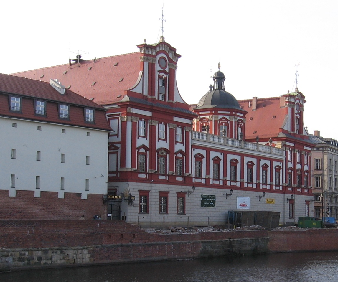 Wrocław, Poland Ossolineum Library